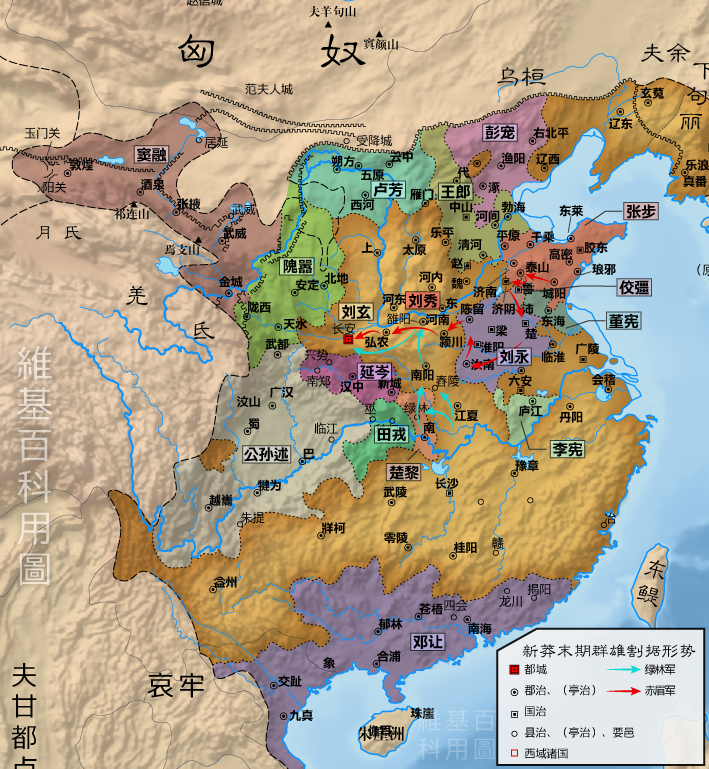 新莽末期群雄割据形势